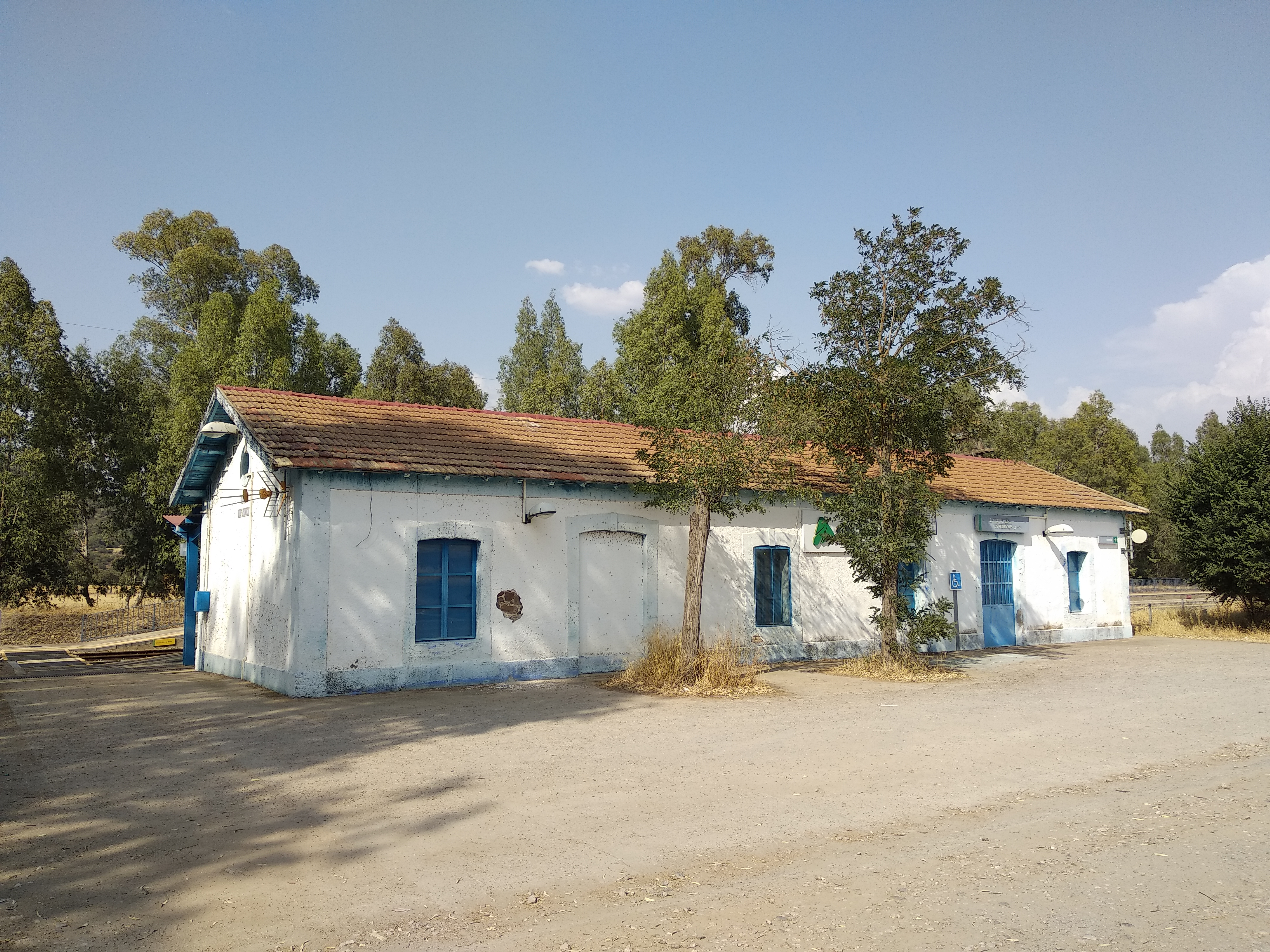 Estación de Guadalmez-Los Pedroches en el municipio ciudadrealeño homónimo en España.